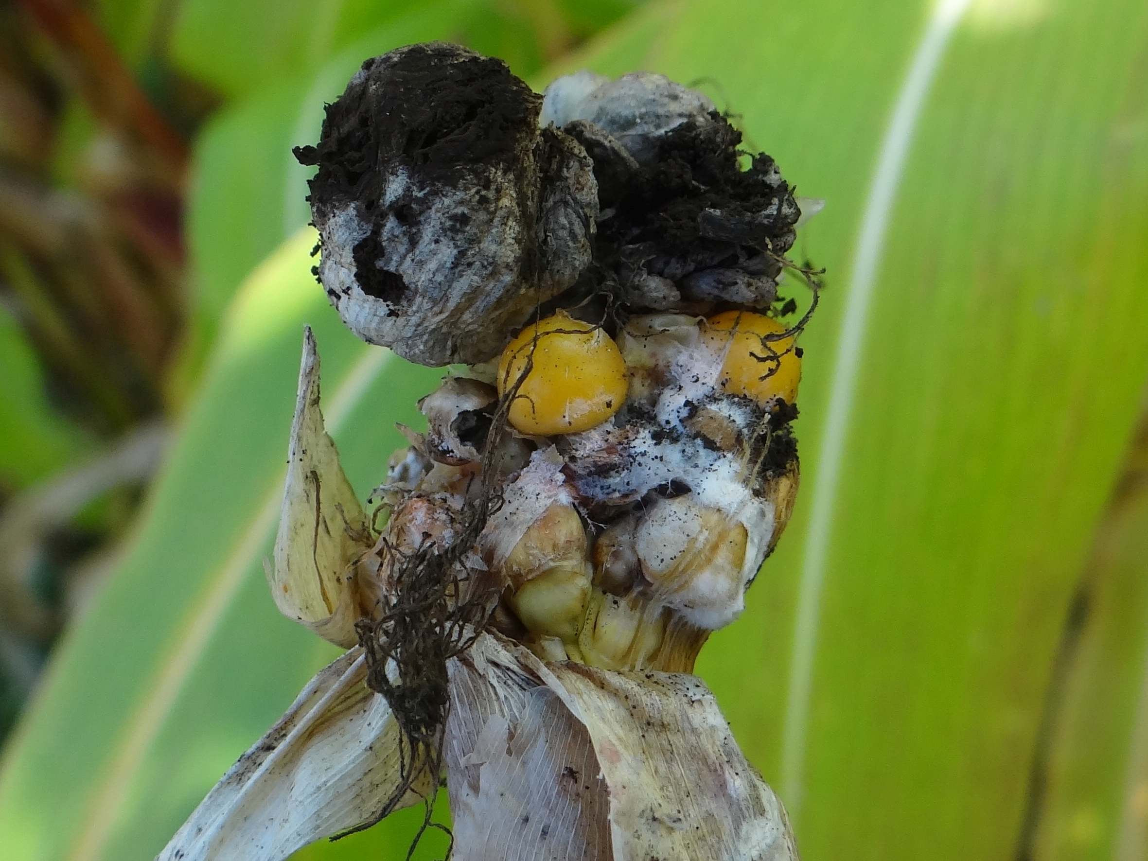 Ustilago maydis on Zea mays (location: Poland, Łapanów)